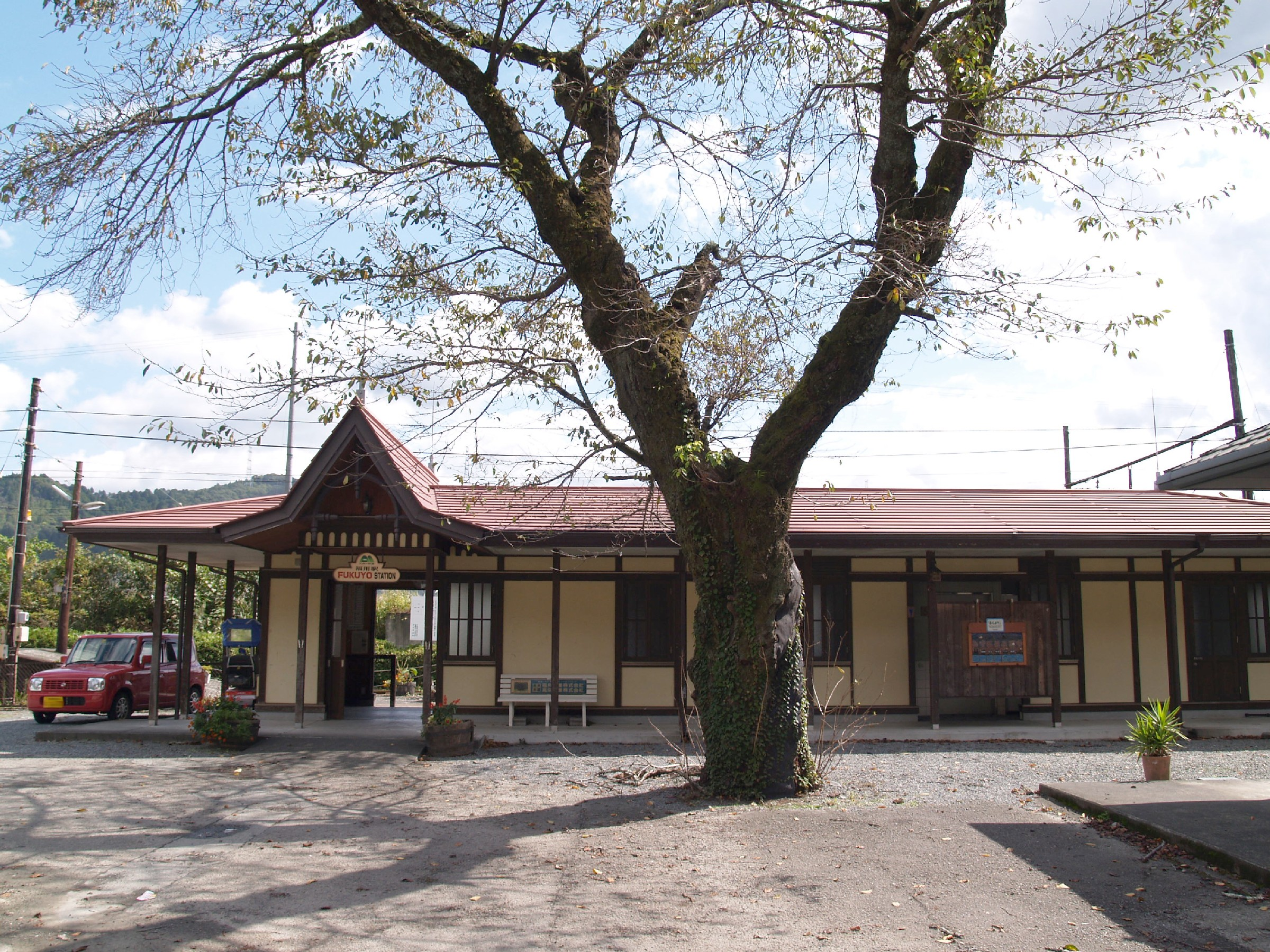 福用駅駅舎